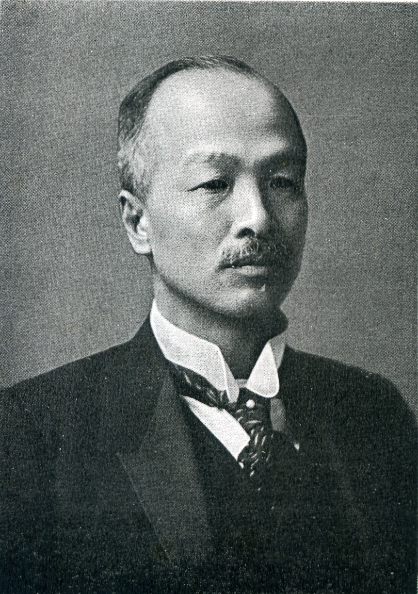 この写真は、勝田銀次郎（1873-1952）の写真です。